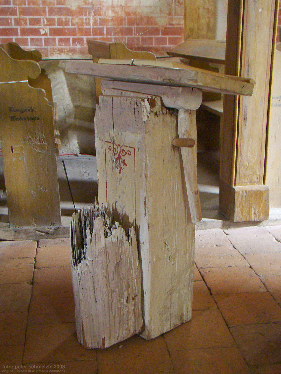 Historischer Ambo in der Kirche in Wredenhagen